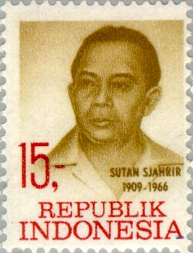 Soetan Sjahrir